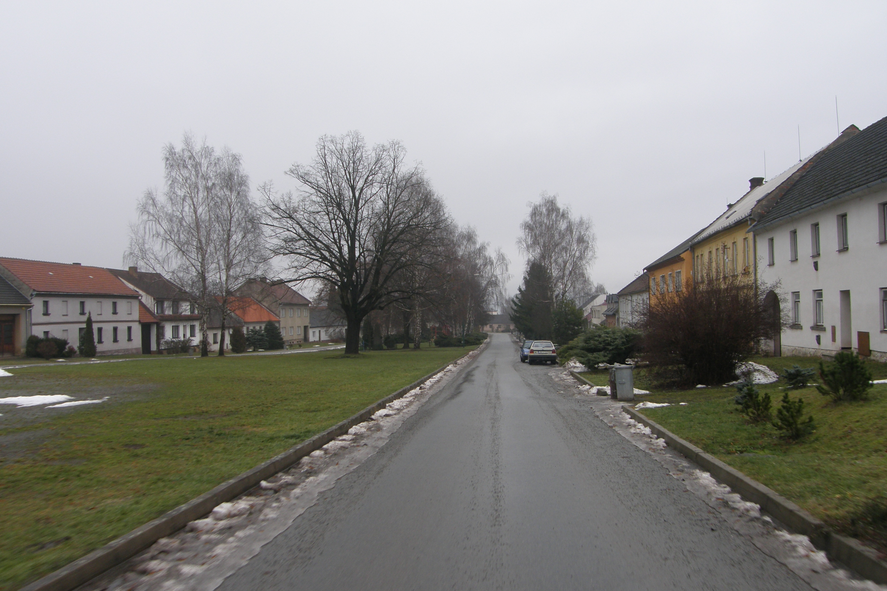 Náves v Borotíně